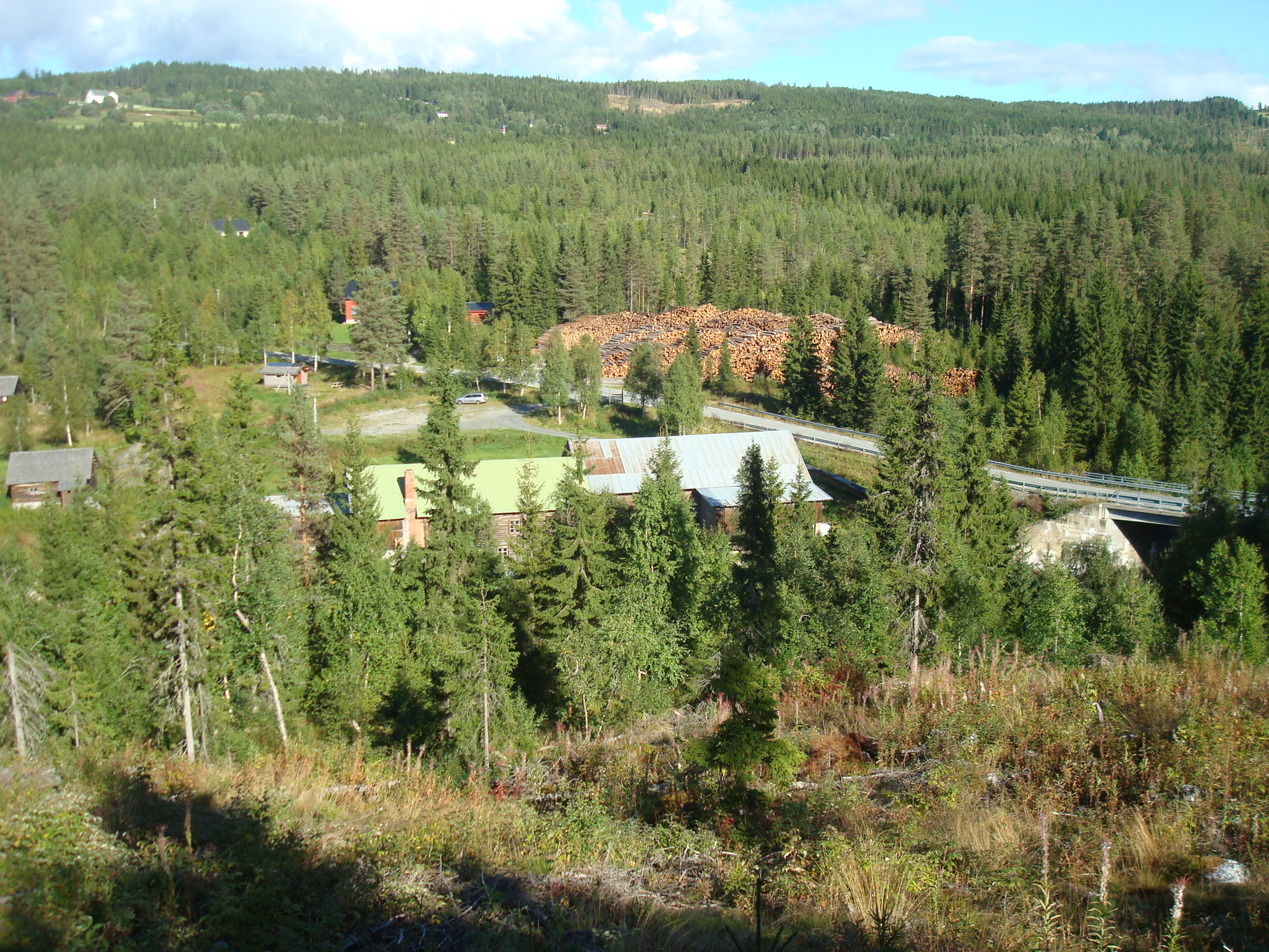 Grønvold sag og mølle i Torpa